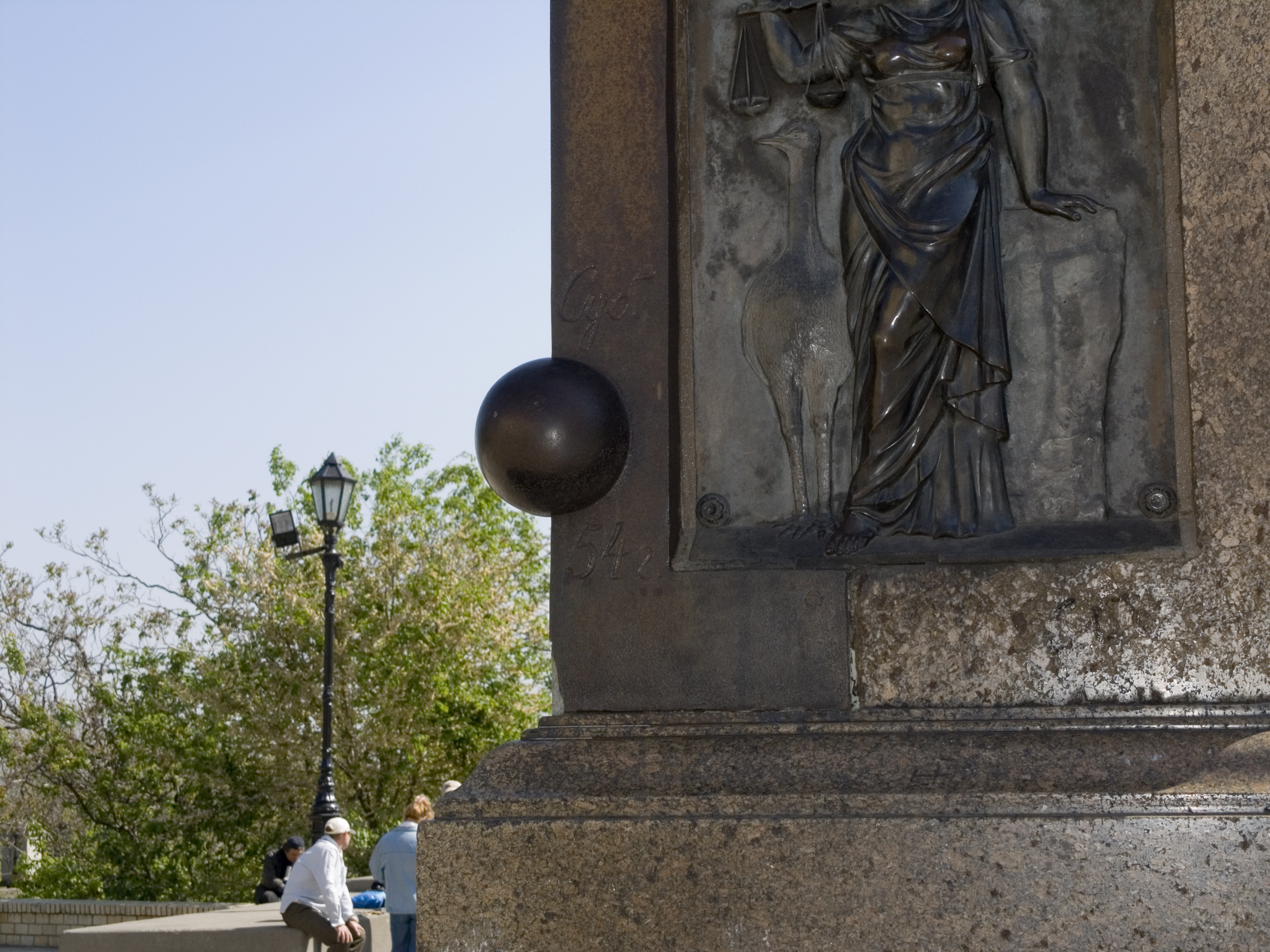 Україна, Одеса - Пам’ятник генерал-губернатору Новоросійського краю А.Е. Ришельє